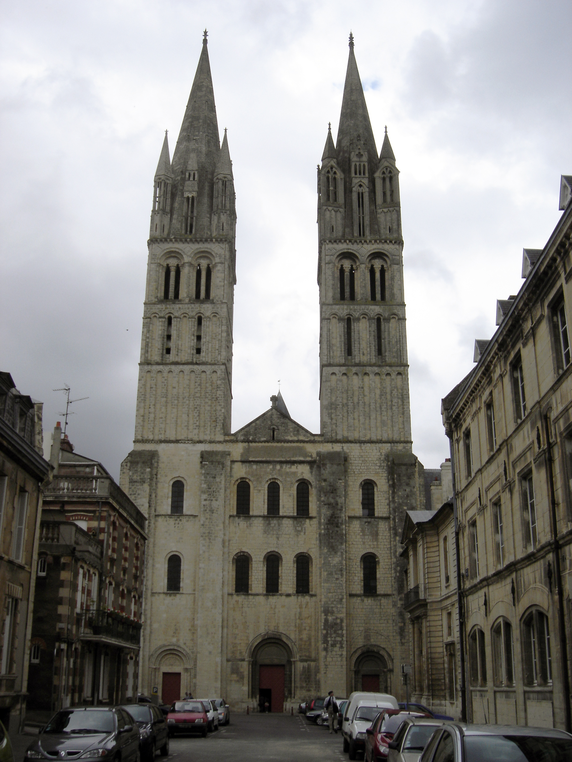 façade occidentale de l'église Saint-Étienne de l'abbaye aux Hommes à Caen (Calvados, Basse-Normandie).